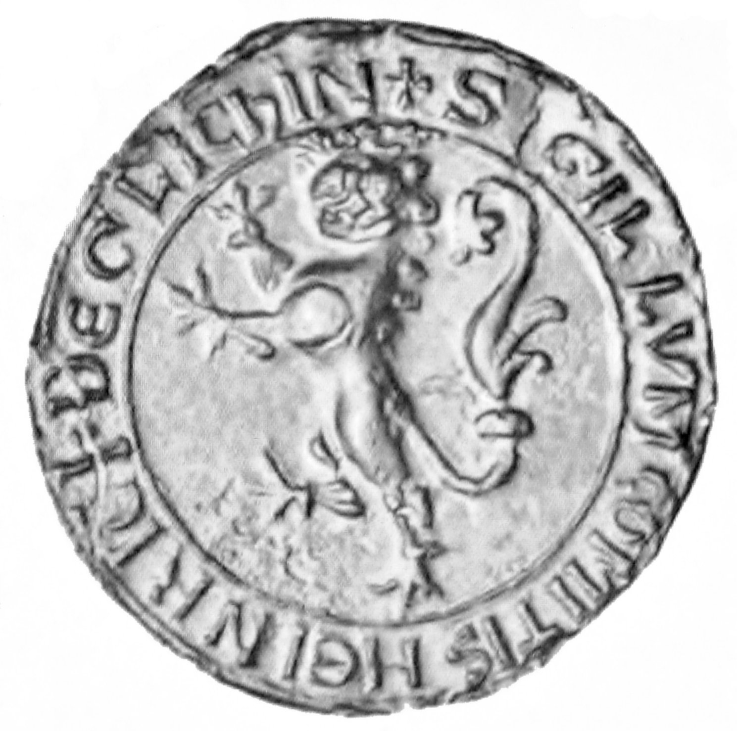 Siegel des Heinrich I. von Gleichen (1239) (SIGULLUM.COMITIS. DE GLICHIN) In: Otto Posse: Die Siegel des Adels der Wettiner Lande. Band III, Verlag Wilhelm Baensch Dresden 1908, Tafel 27 Nr. 6